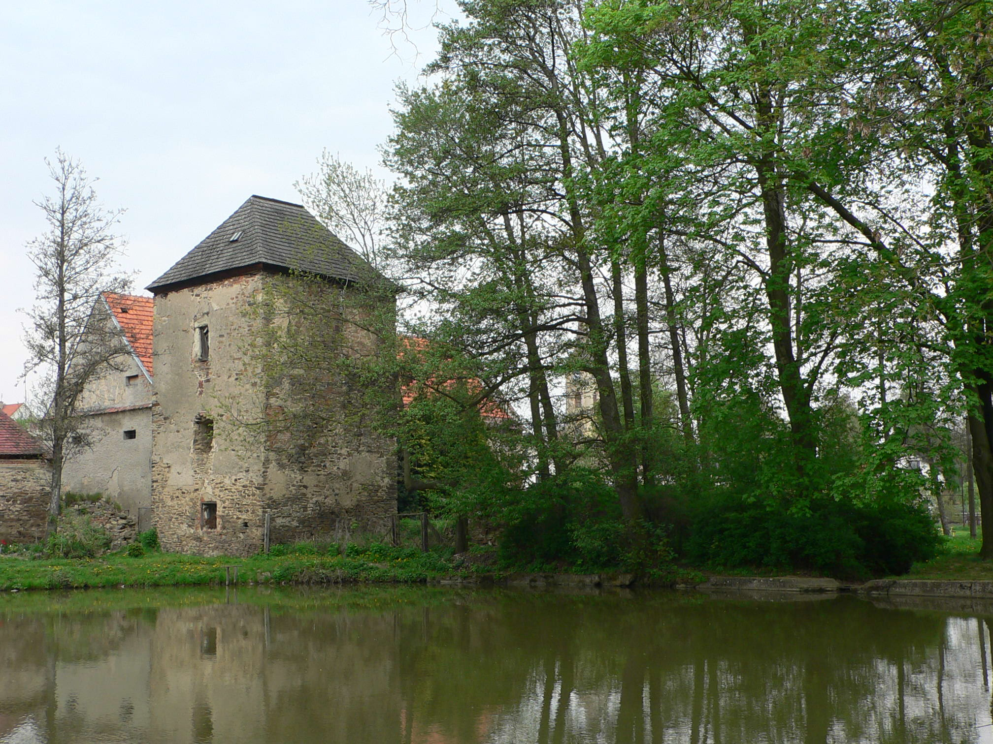 Tvrz Malotice, u rybníka pod kostelem.